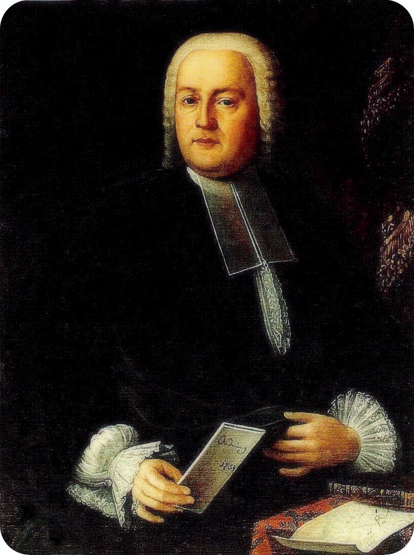 Anton Leonz Irenäus Schumacher, 1711-1775, Statthalter, Oberstleutnant